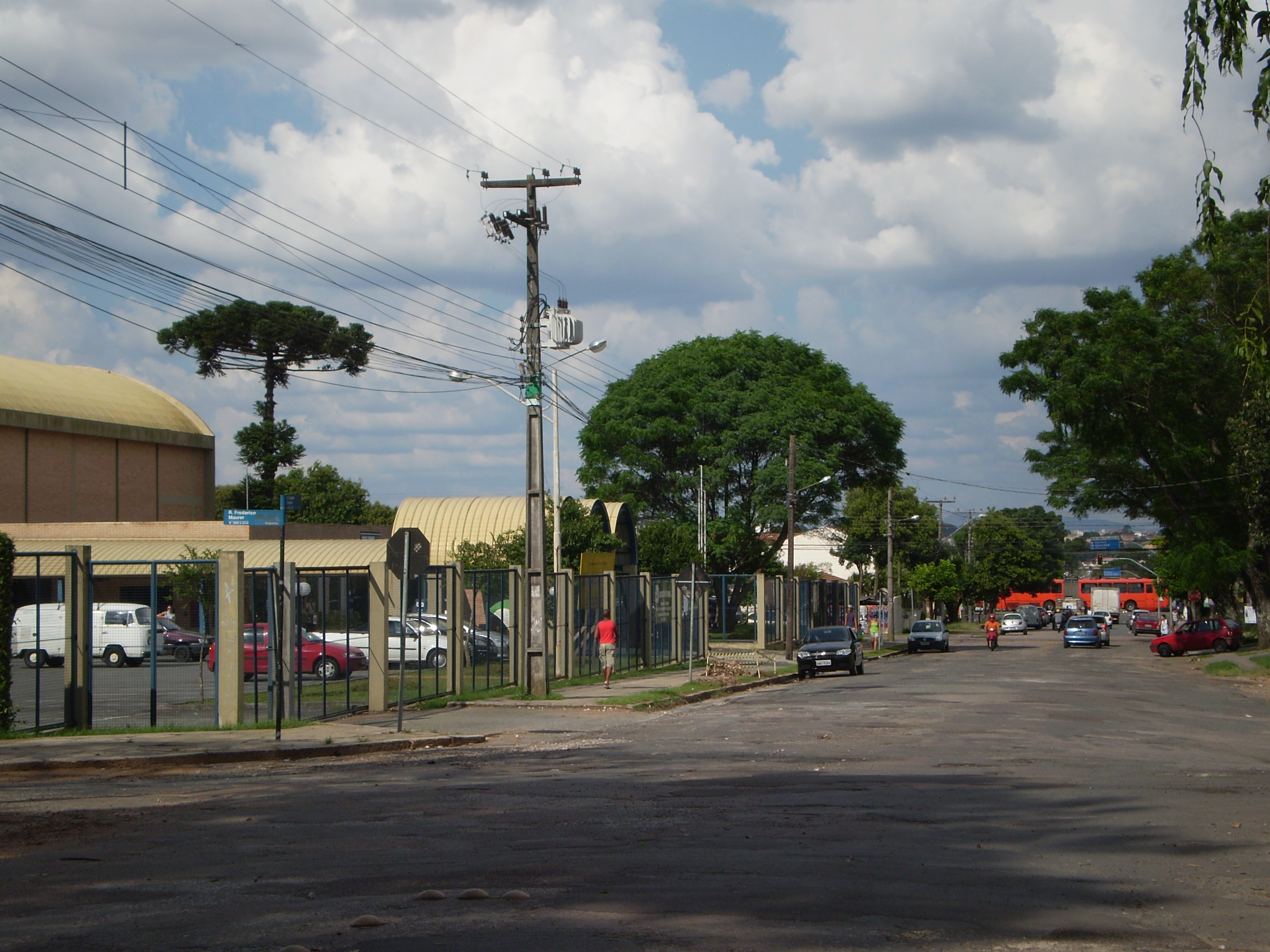 Rua Salvador Ferrante - Boqueirão - Curitiba - PR